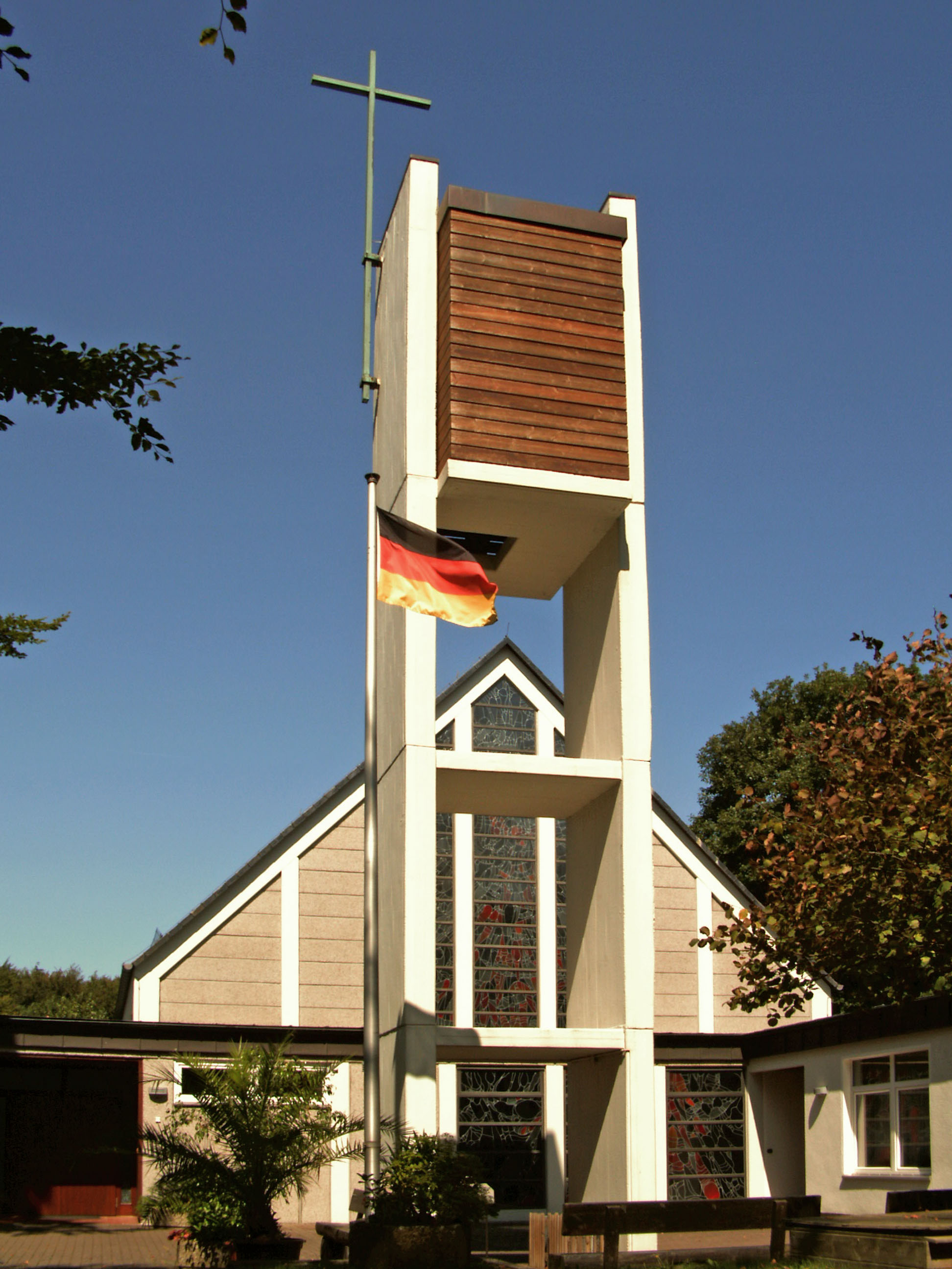 Katholische Kirche Hl. Kreuz in Dungelbeck, Ortsteil von Peine